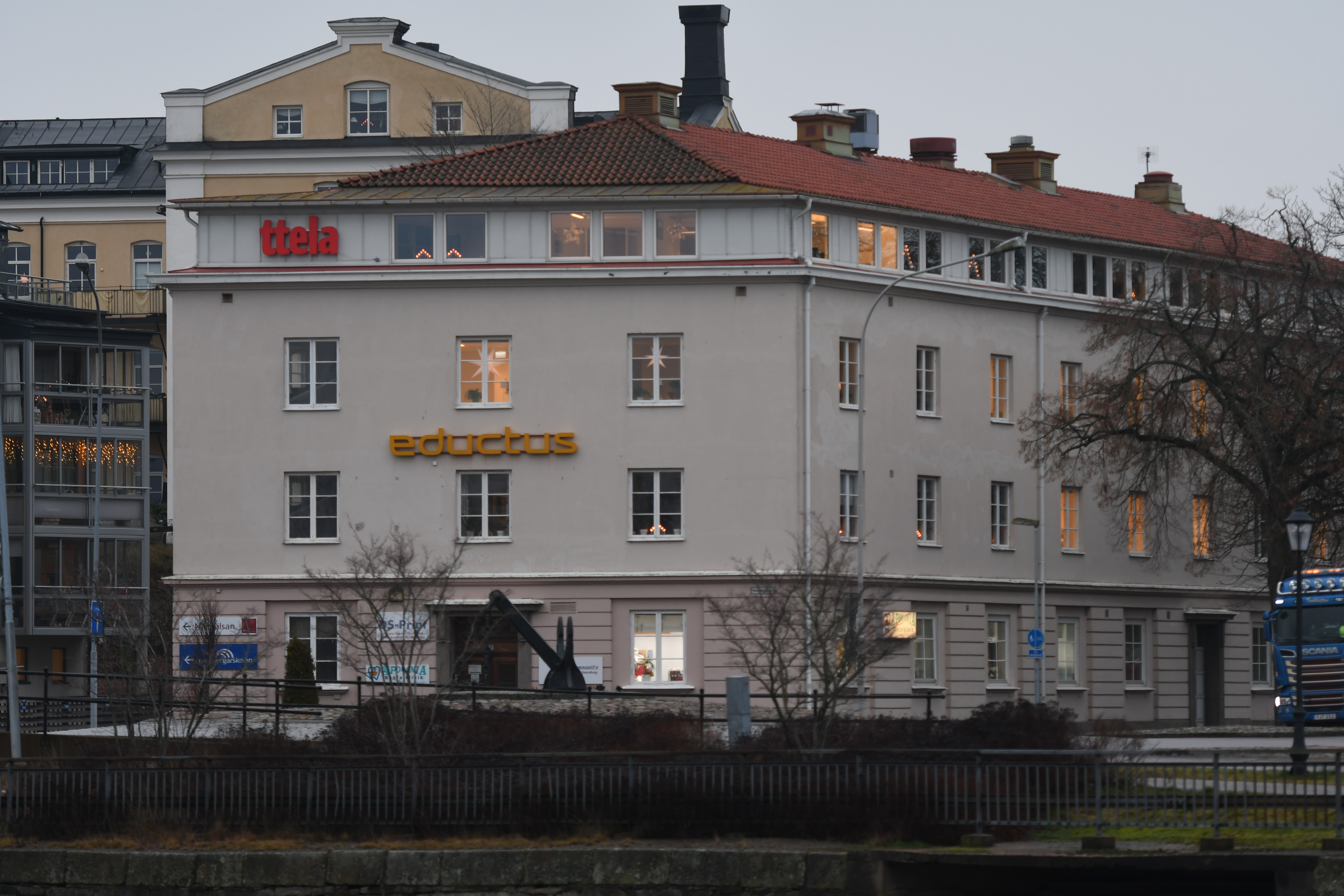 Byggnad i Vänersborg, längs hamnkanalen, med TTELA:s lokaler.